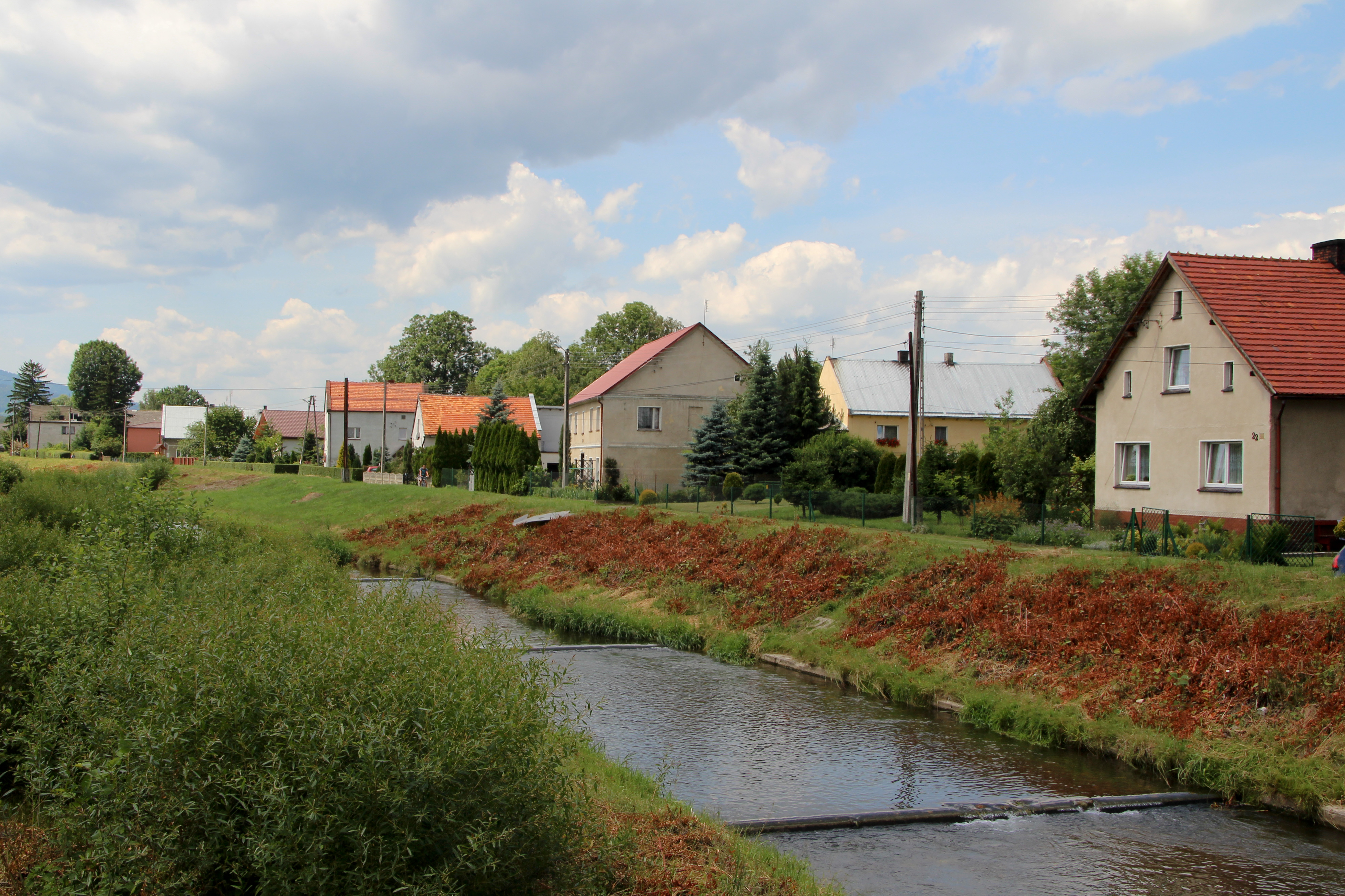 Łąka Prudnicka -wieś w Polsce w województwie opolskim, w powiecie prudnickim w gminie Prudnik.